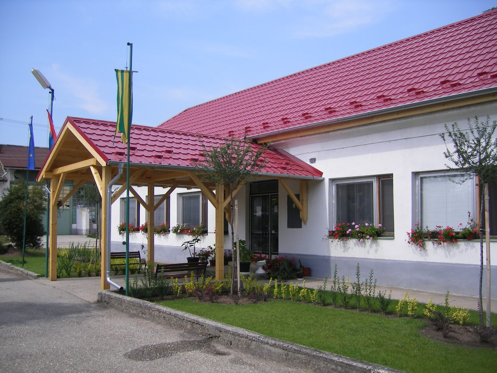 Bajcs - községháza